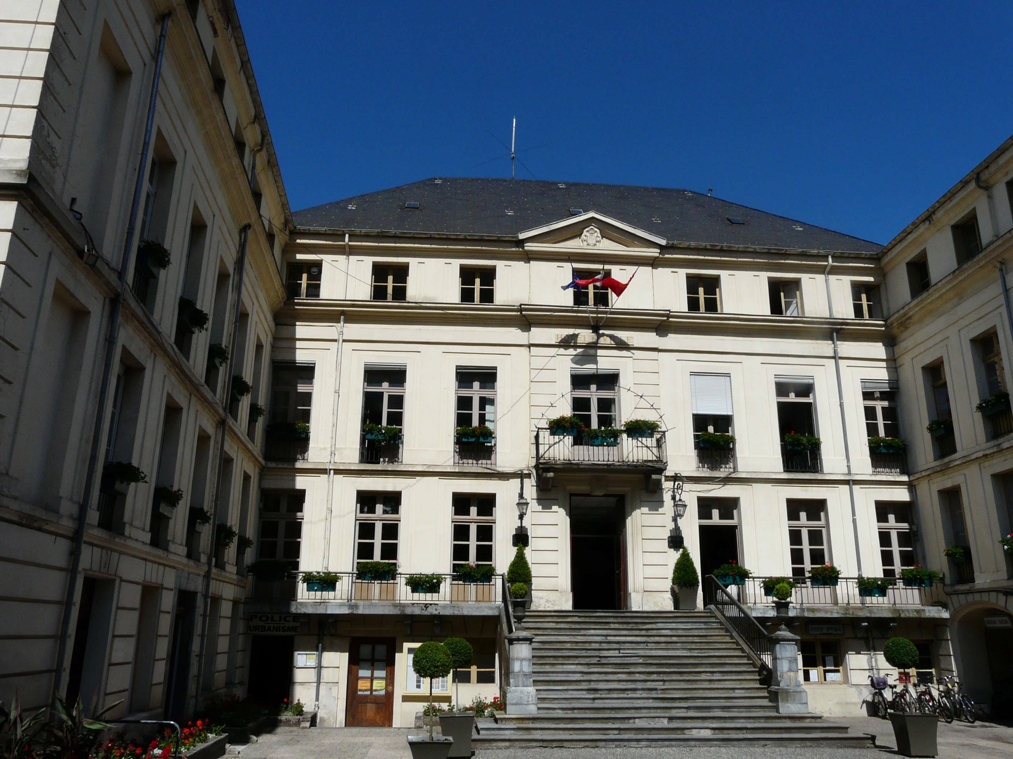 La mairie de Bagnères-de-Luchon, Haute-Garonne, France.